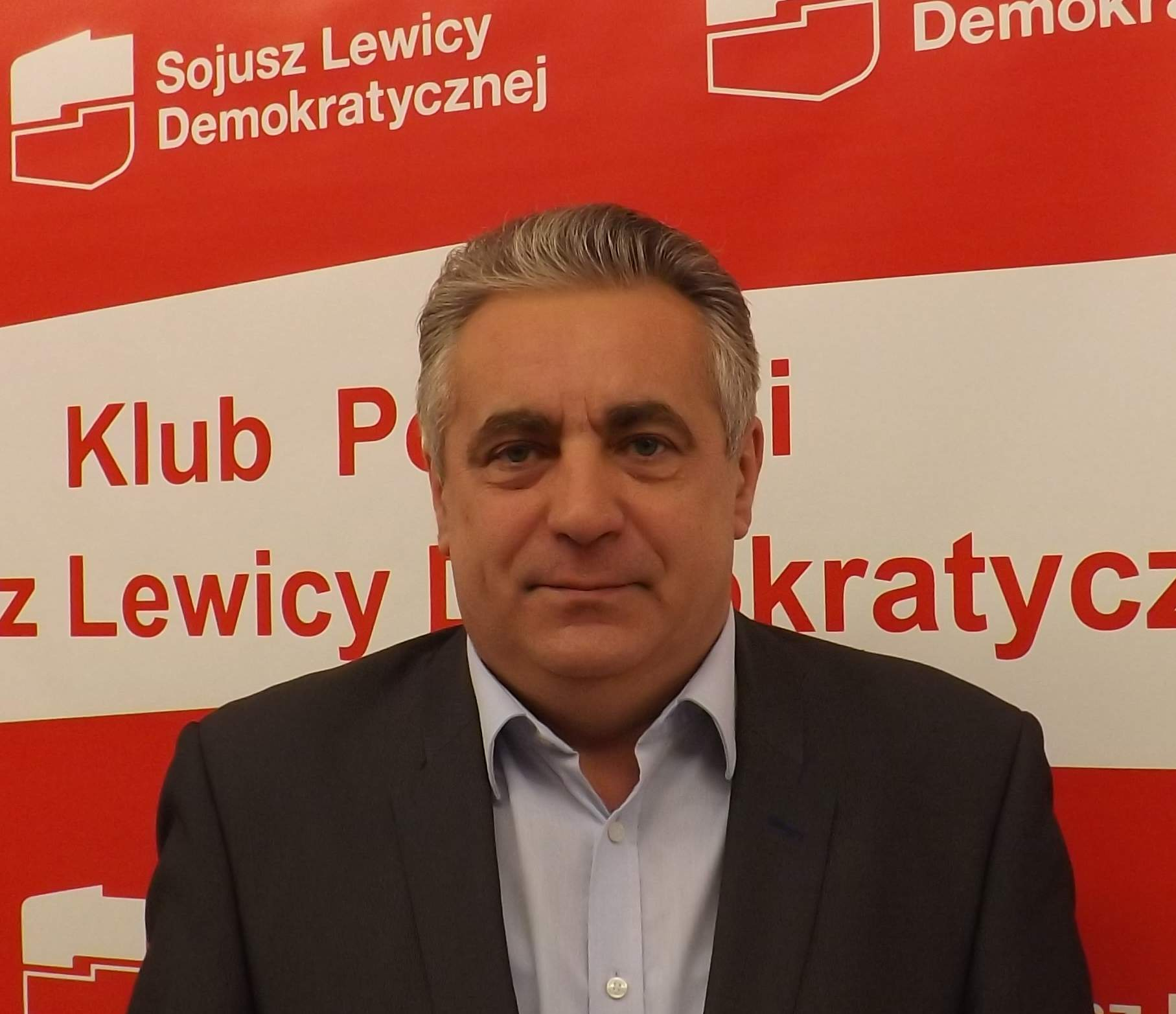 Leszek Aleksandrzak, poseł SLD